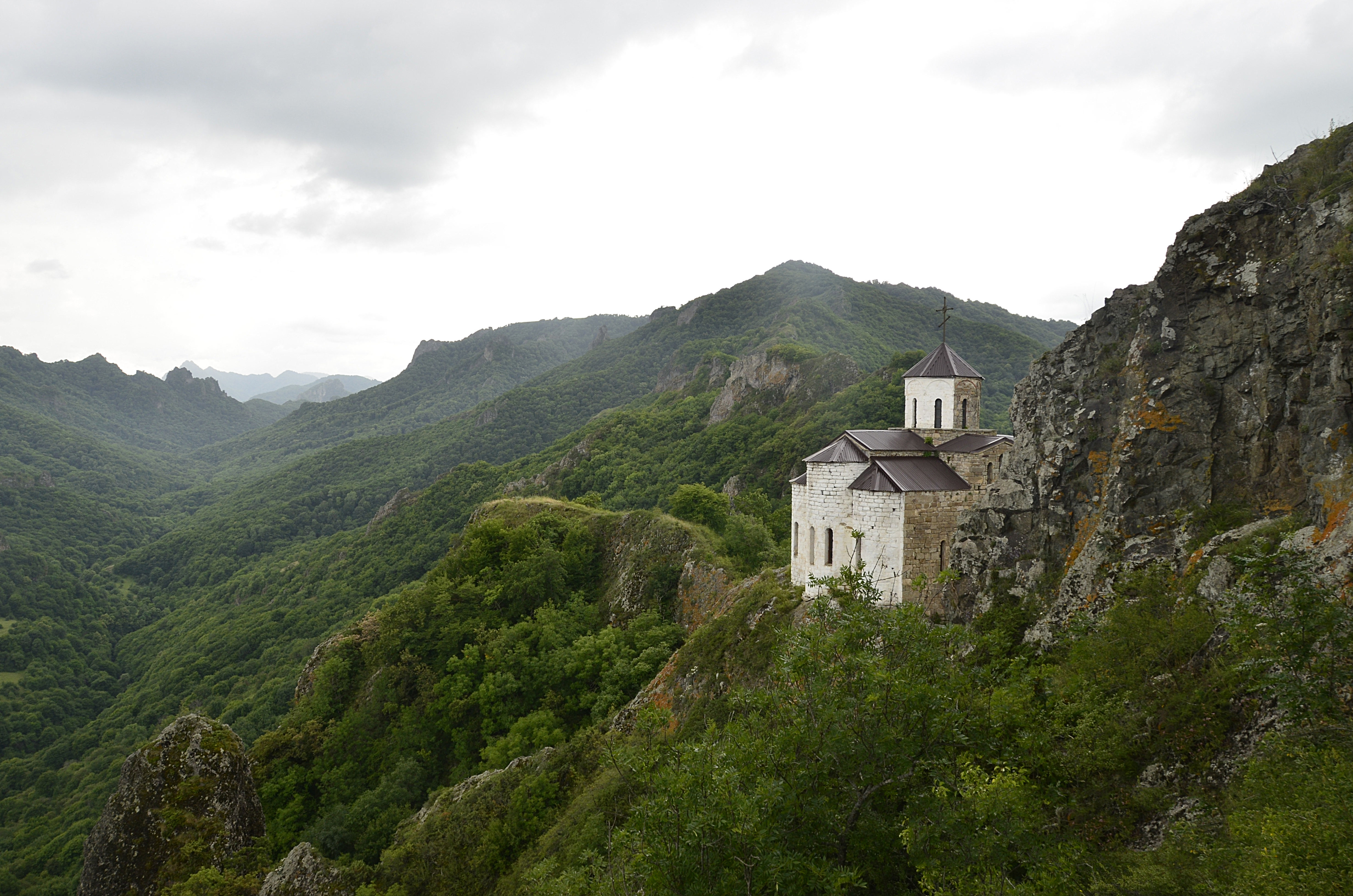 Шоанинский древнехристианский храм (Республика Карачаево-Черкессия, Карачаевск, посёлок Коста Хетагурова, (3 км южнее поселка, на горе Шоана))